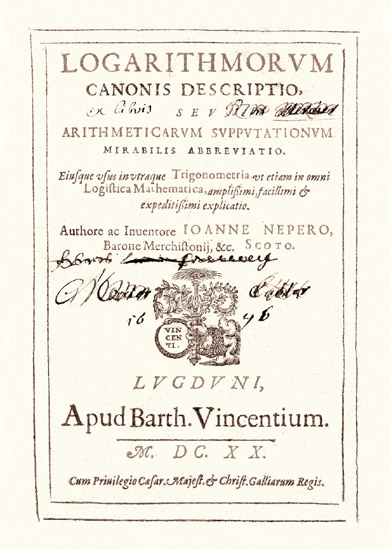 John Napier - Mirifici logarithmorum canonis descriptio (ed 1618)